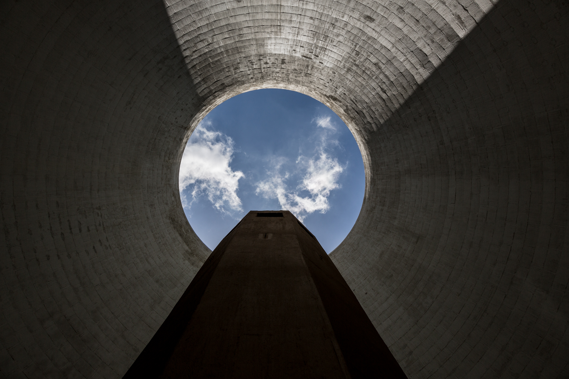 הלבניות, מתחם בז"ן, מפרץ חיפה